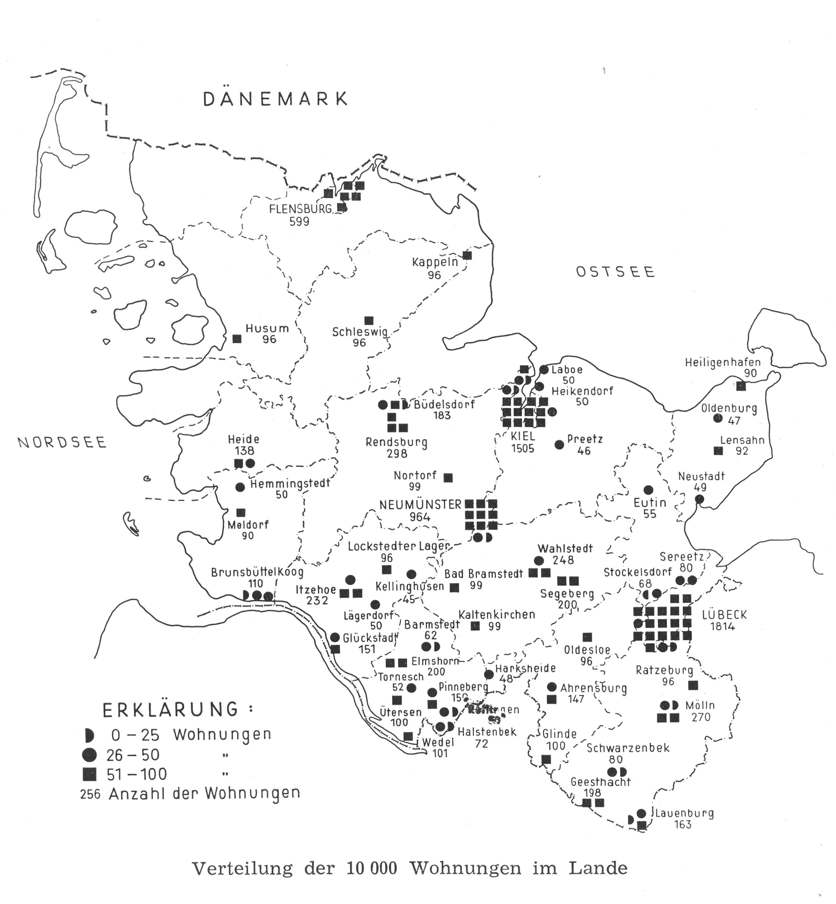 Karte der Verteilung der 10000 ERP Wohnung in Schleswig-Holstein